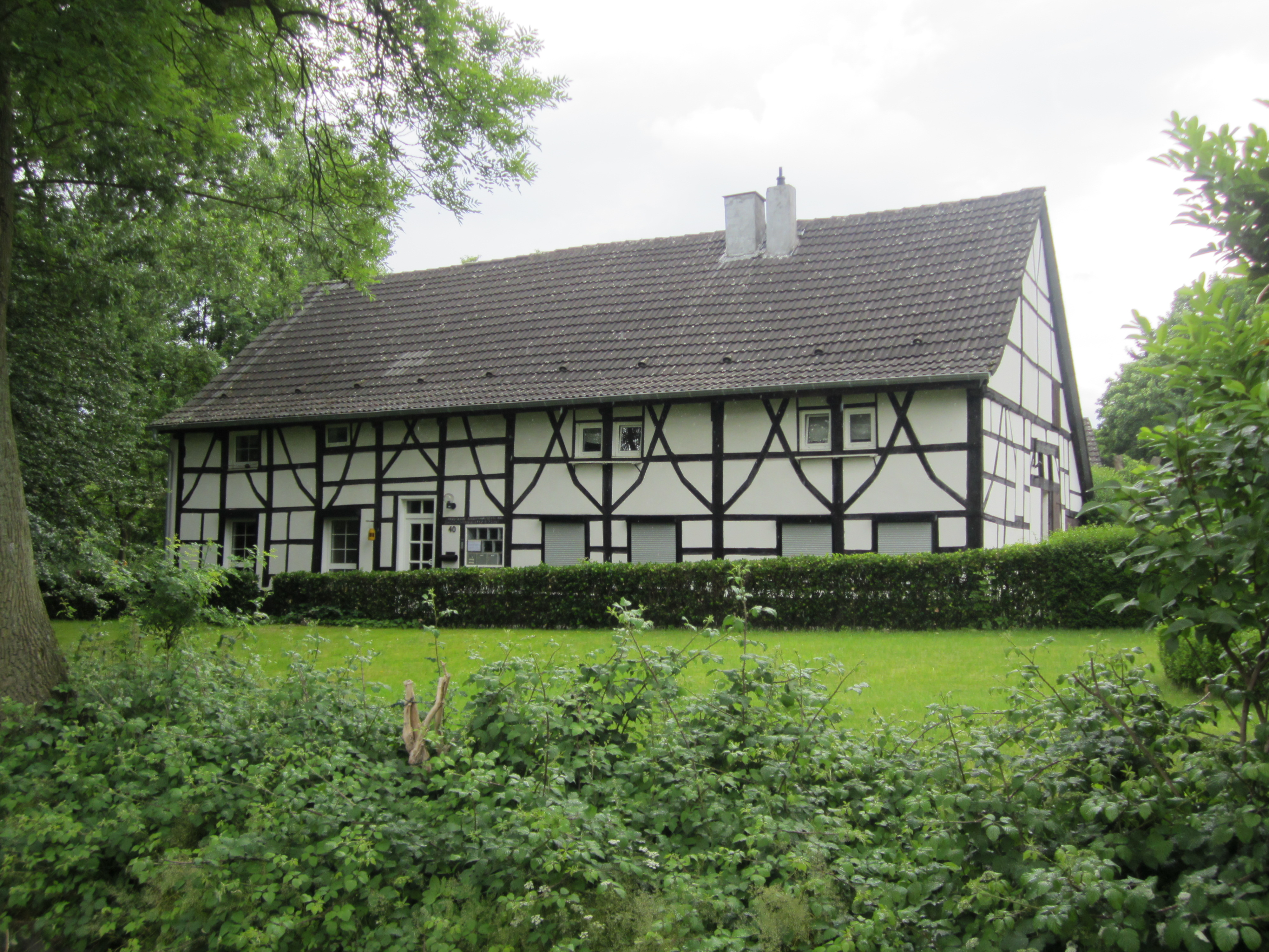 Ehem. Brinkmannshof in Essen-Bedingrade, Bedingrader Straße 40